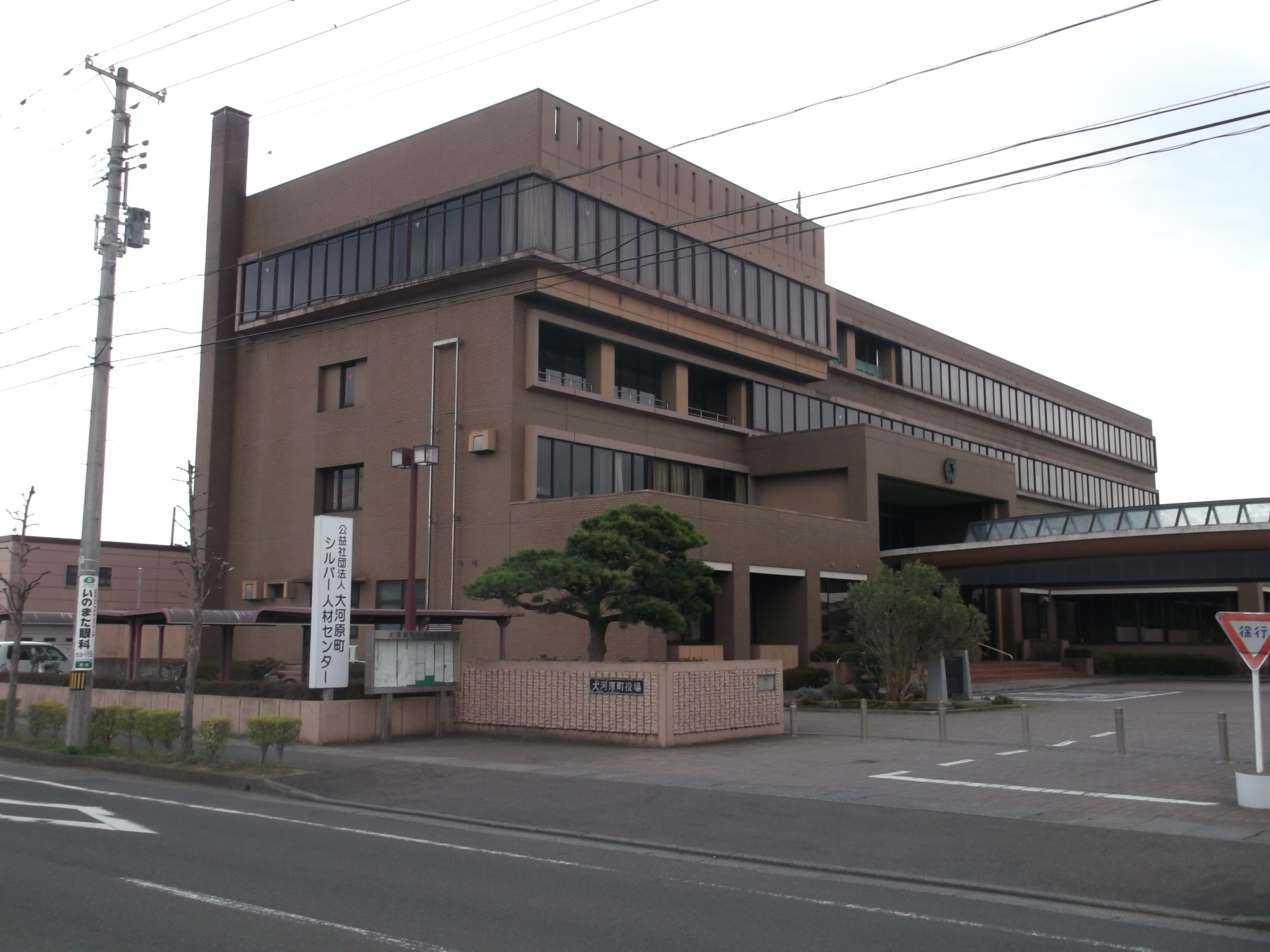 大河原町役場